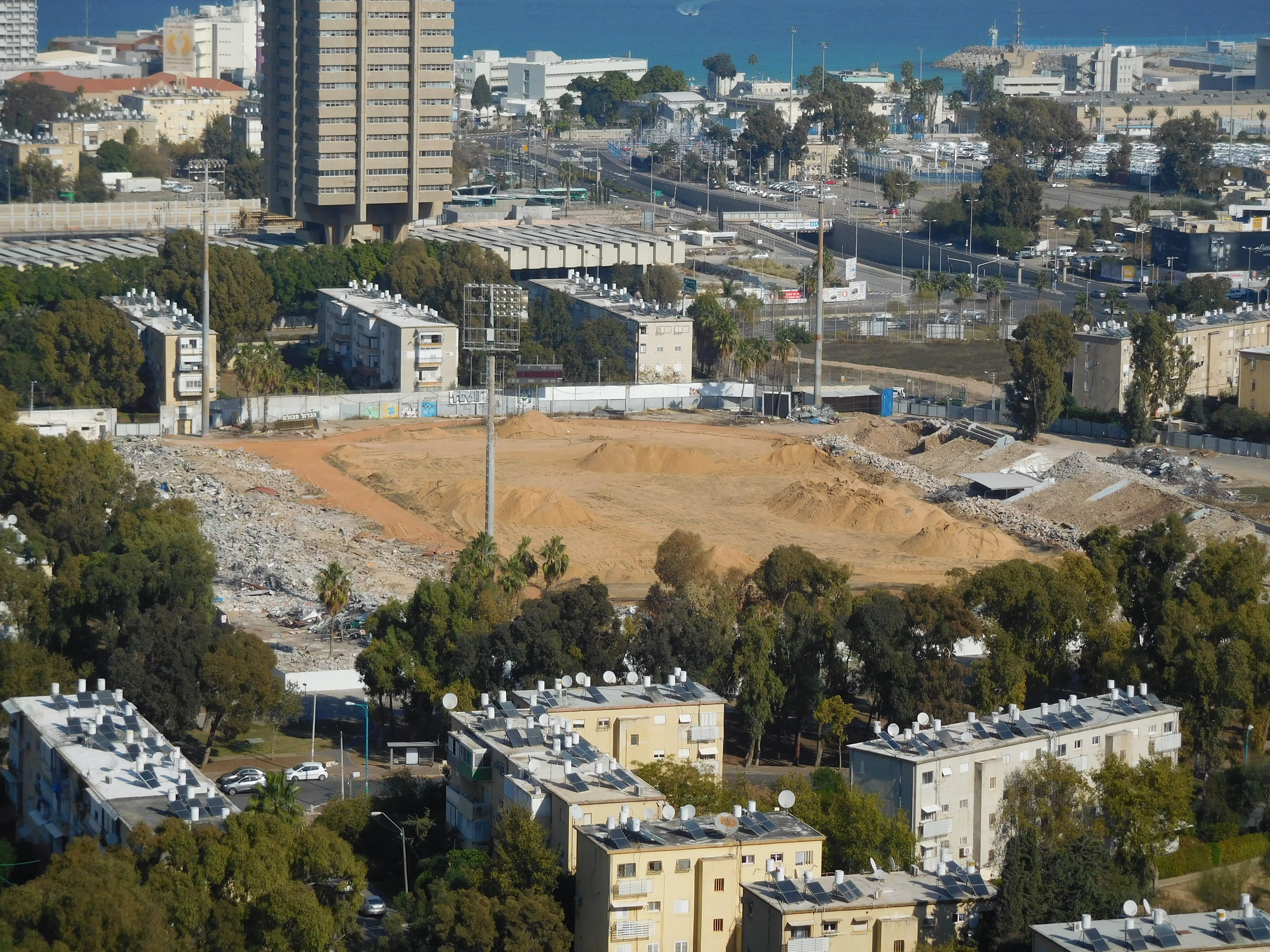 העבודות להריסת אצטדיון קריית אליעזר, מבט מדרך סטלה מאריס